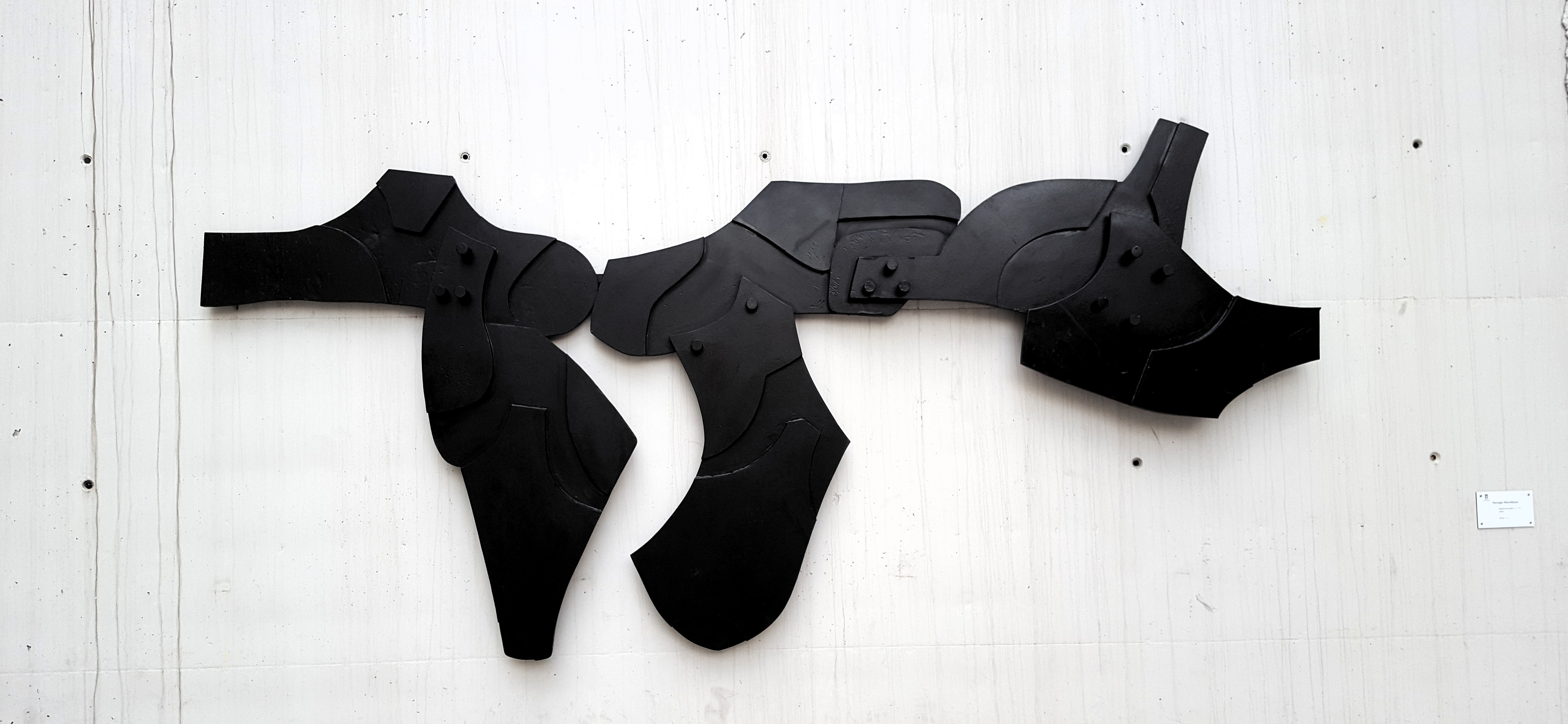 Remigio Mendibururen eskultura